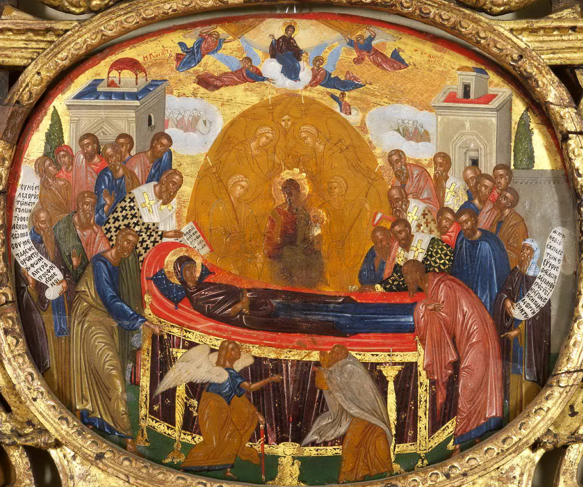 Η Κοίμηση της Παναγίας γύρω στο 1600, 37,5x32,2εκ. άγνωστος ζωγράφος από την Κρήτη Στην εικόνα αυτή με το ελλειψοειδές σχήμα παριστάνονται η Κοίμηση της Θεοτόκου, η Μετάσταση και το επεισόδιο του Ιεφωνία. Η Κοίμηση της Θεοτόκου με τη μεγάλη νεκρική κλίνη, τον Χριστό που παραλαμβάνει την ψυχή της Παναγίας, τους αποστόλους και τους δύο υμνογράφους, Ιωάννη Δαμασκηνό και Κοσμά Μελωδό, αναπτύσσεται στο κεντρικό τμήμα της επιφάνειας. Οι απόστολοι έρχονται από τα πέρατα του κόσμου επάνω σε δύο νεφελώματα. Όπως συνηθίζεται, το επεισόδιο με τον αρχάγγελο Μιχαήλ που κόβει τα χέρια του Ιεφωνία, παριστάνεται σε μικρότερη κλίμακα μπροστά από την κλίνη και στον ουρανό βρίσκεται η Μετάσταση της Θεοτόκου. Στο τελευταίο επεισόδιο η Παναγία μεταφέρεται επάνω σε νεφέλωμα από δύο αγγέλους στον ουρανό. Δύο άλλοι άγγελοι έχουν ανοίξει τις πύλες του ουρανού για να την υποδεχτούν. Η κορνίζα είναι ξυλόγλυπτη με διάτρητη διακόσμηση σε στυλ μπαρόκ, που περιλαμβάνει την αετωματική επίστεψη, αγγέλους, γιρλάντες και ερωτιδείς.